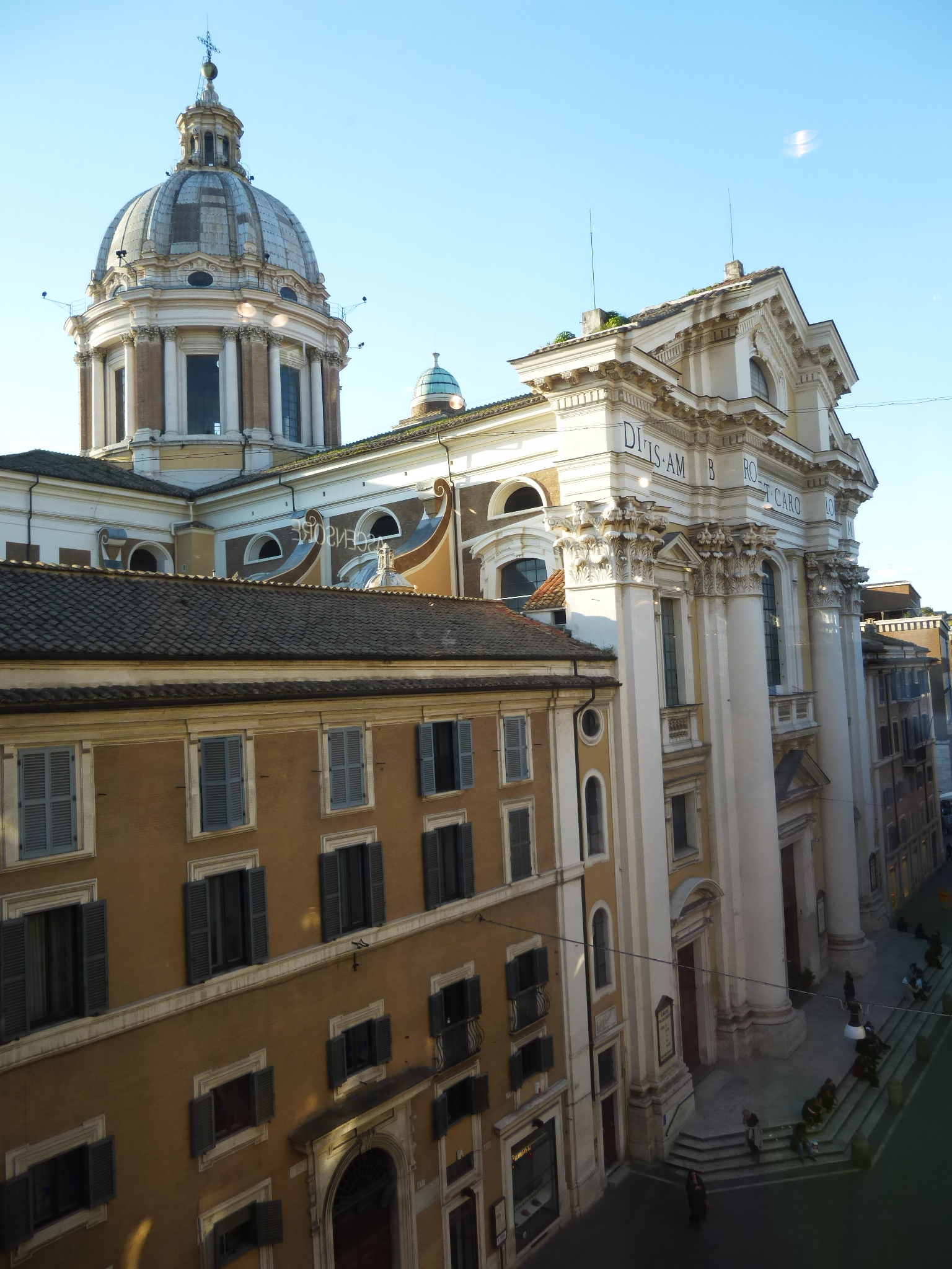 Roma, santi Ambrogio e Carlo al Corso dal Palazzo dell'Unione militare